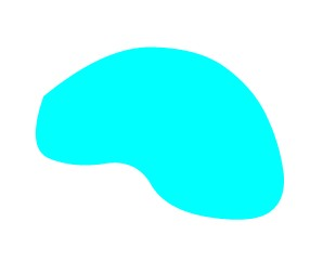 Esou gett e Séi oder e Wéier op enger Landkaart duergestallt.